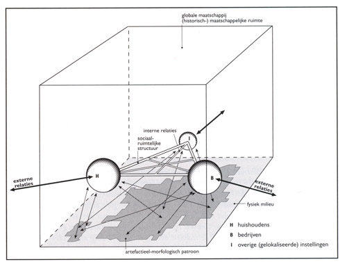 Publicatierecht verkregen van de maker van de kubus: Gerard Hoekveld